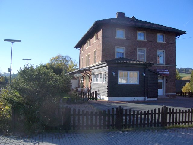 Der Bahnhof Marxgrün im Oktober 2005. Das Gebäude ist mittlerweile an privat verkauft und wird als Ferienappartement genutzt. In der Bildmitte ist der Stellwerksanbau zu erkennen.